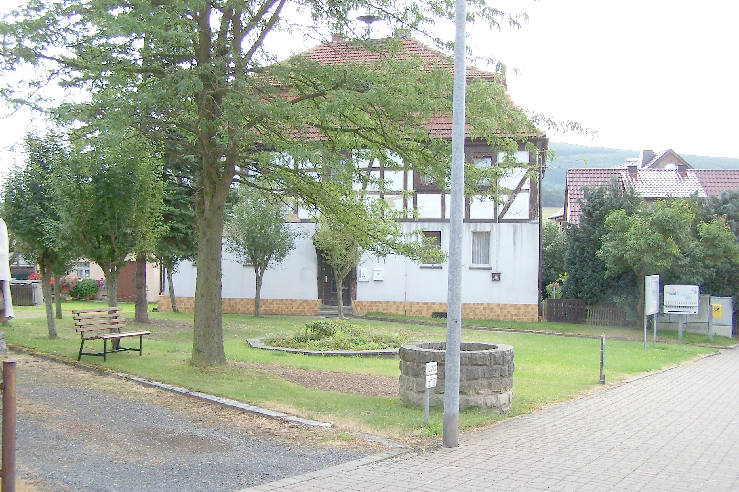 Gehaus